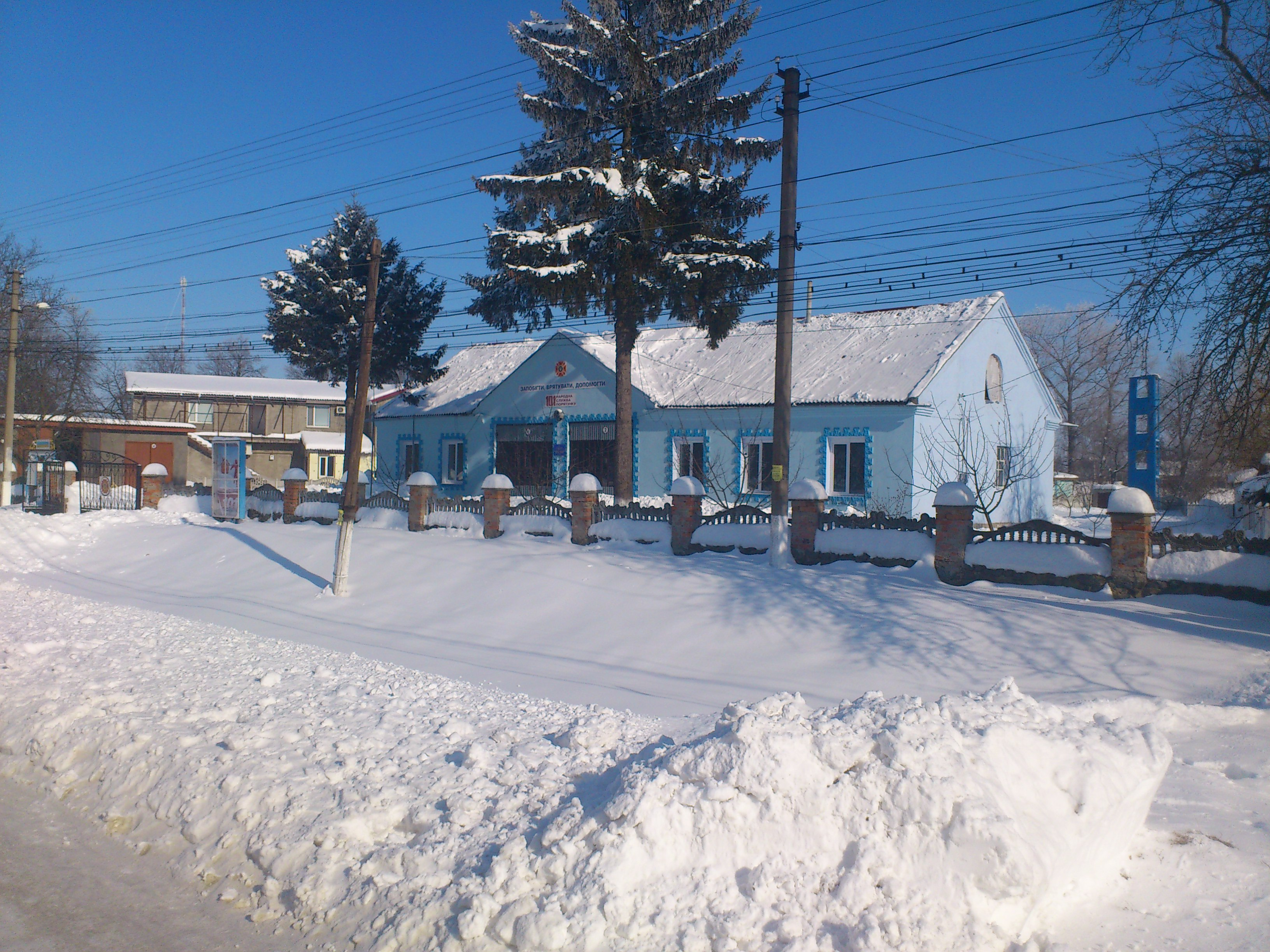 Пожежна частина, зима 2012